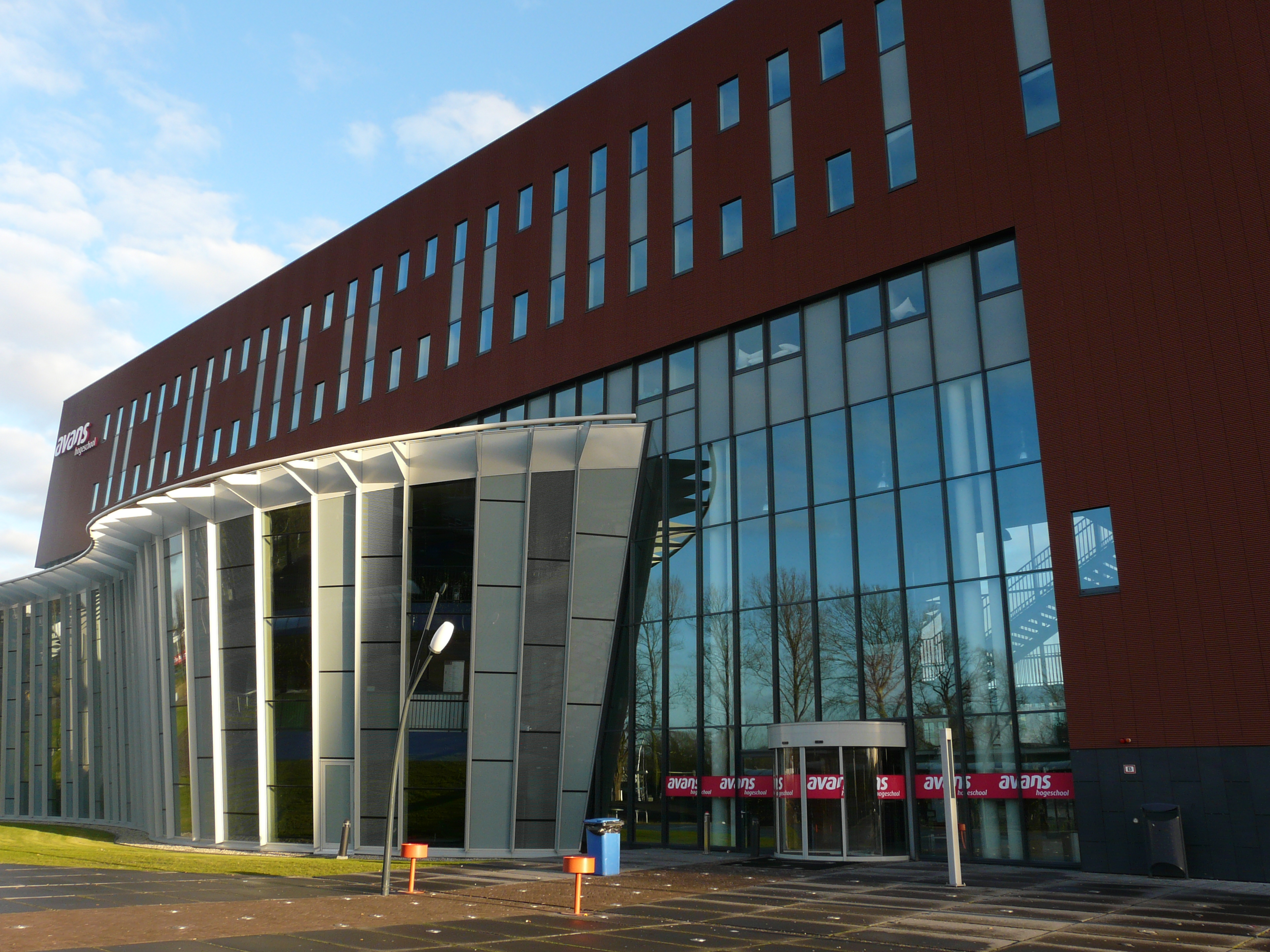 Zicht op een deel van de Avans Hogeschool Breda aan de Hogeschoollaan 1 in Breda